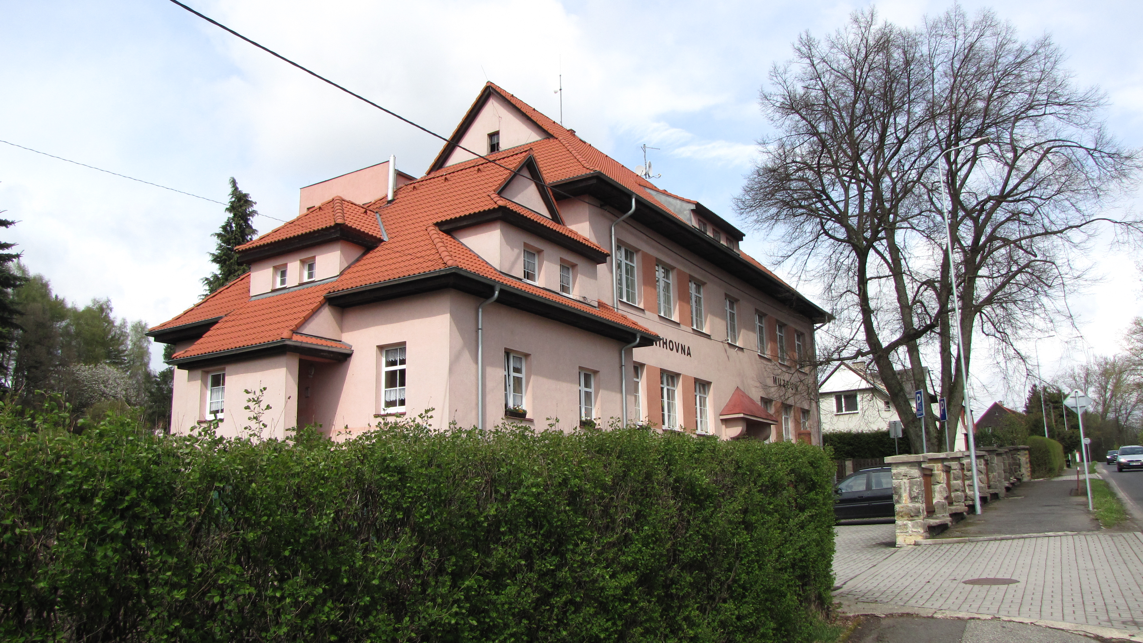 Muzeum bezpečnostních sborů